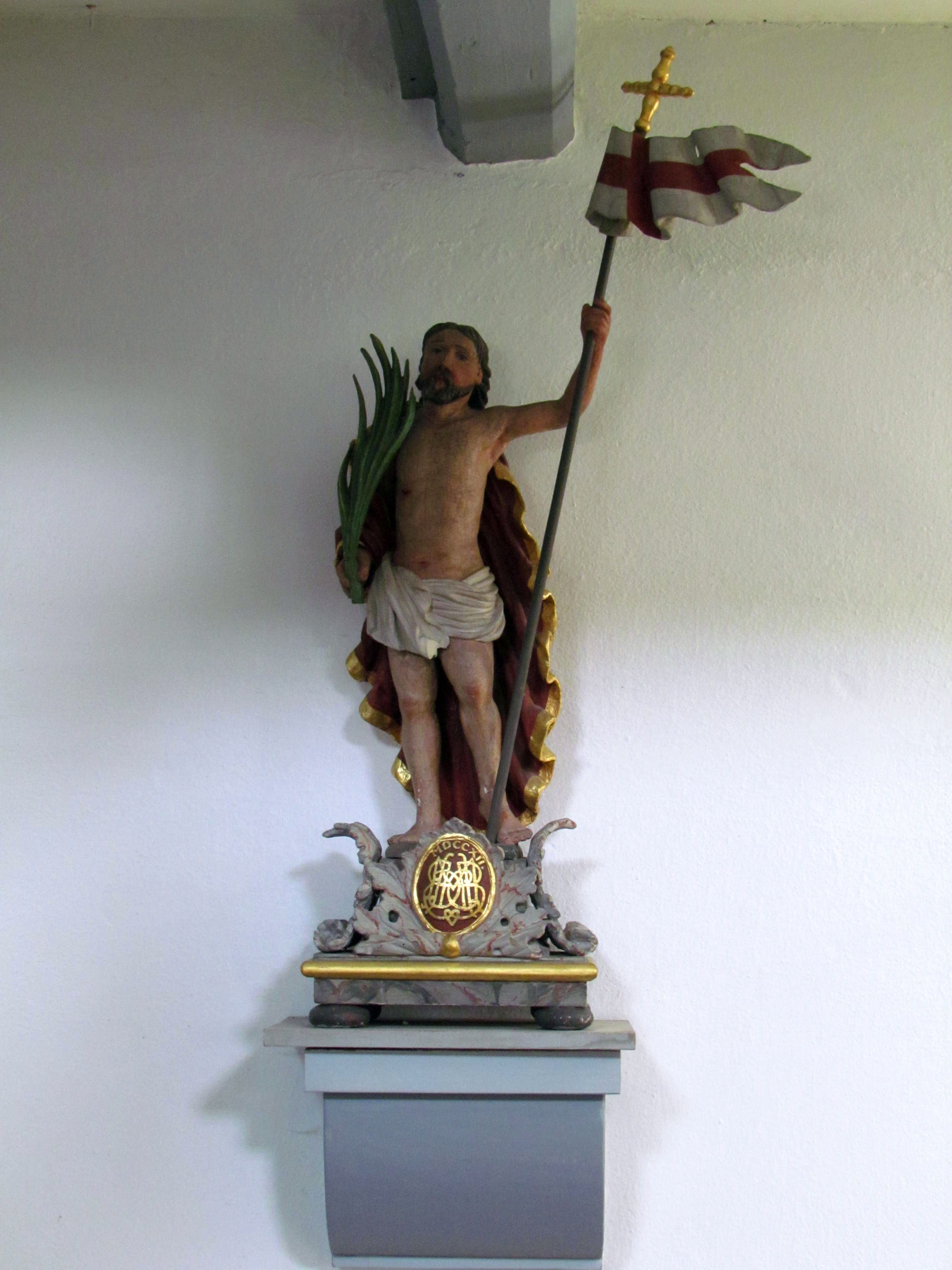 Aus dem Jahr 1712 stammt diese geschnitzte Figur des auferstandenen Jesus Christus. Das Datum MDCCXII = 1712 findet sich im Sockel der Plastik - rotes Oval über den Initialen (des Stifters?).